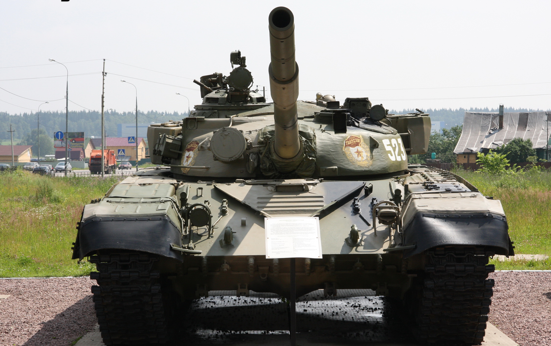 Т-72А